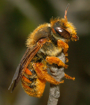 Anthidium sticticum femelle, à Cassis (13), France.